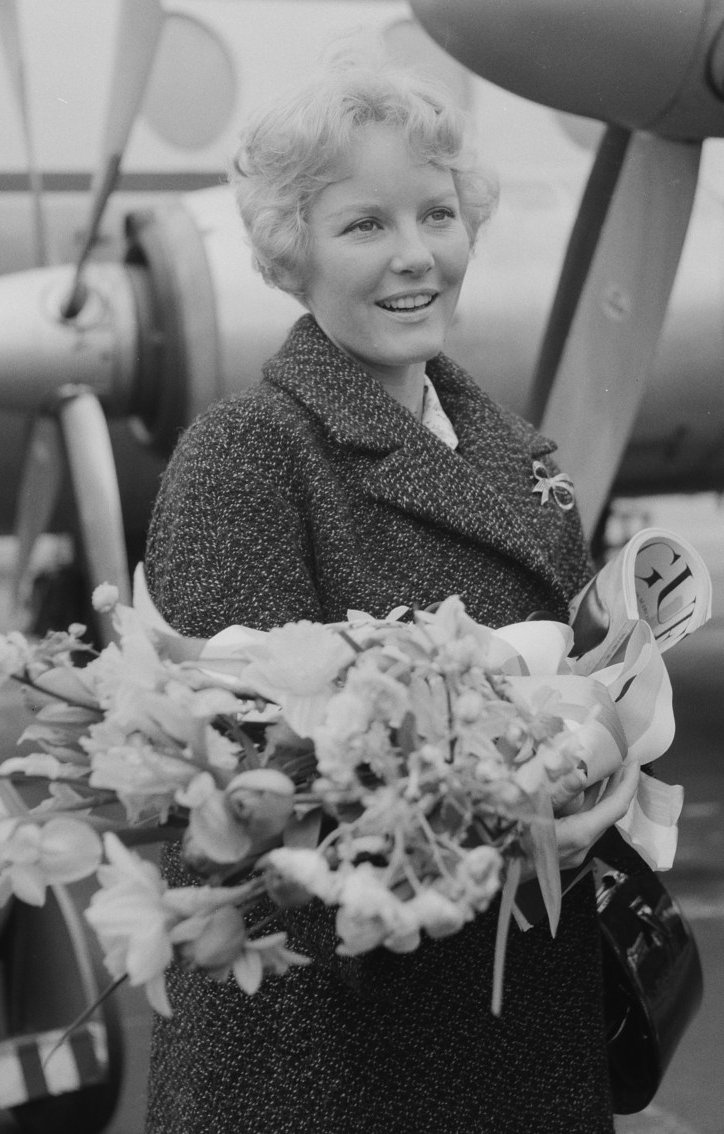 Aankomst Petula Clark op Schiphol, Petula Clark met bloemen